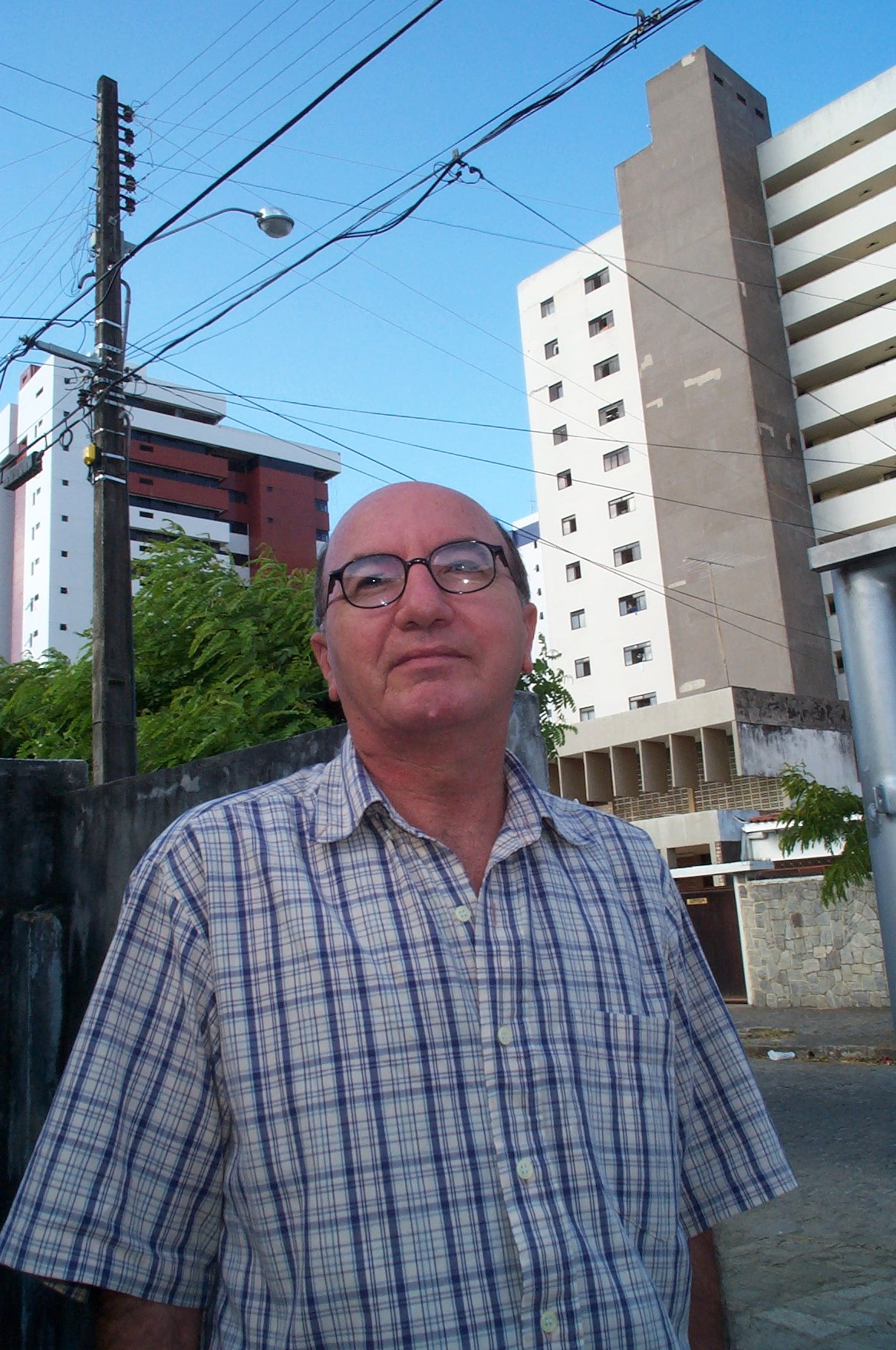 João Batista de Brito, crítico de cinema em João Pessoa, no Brasil